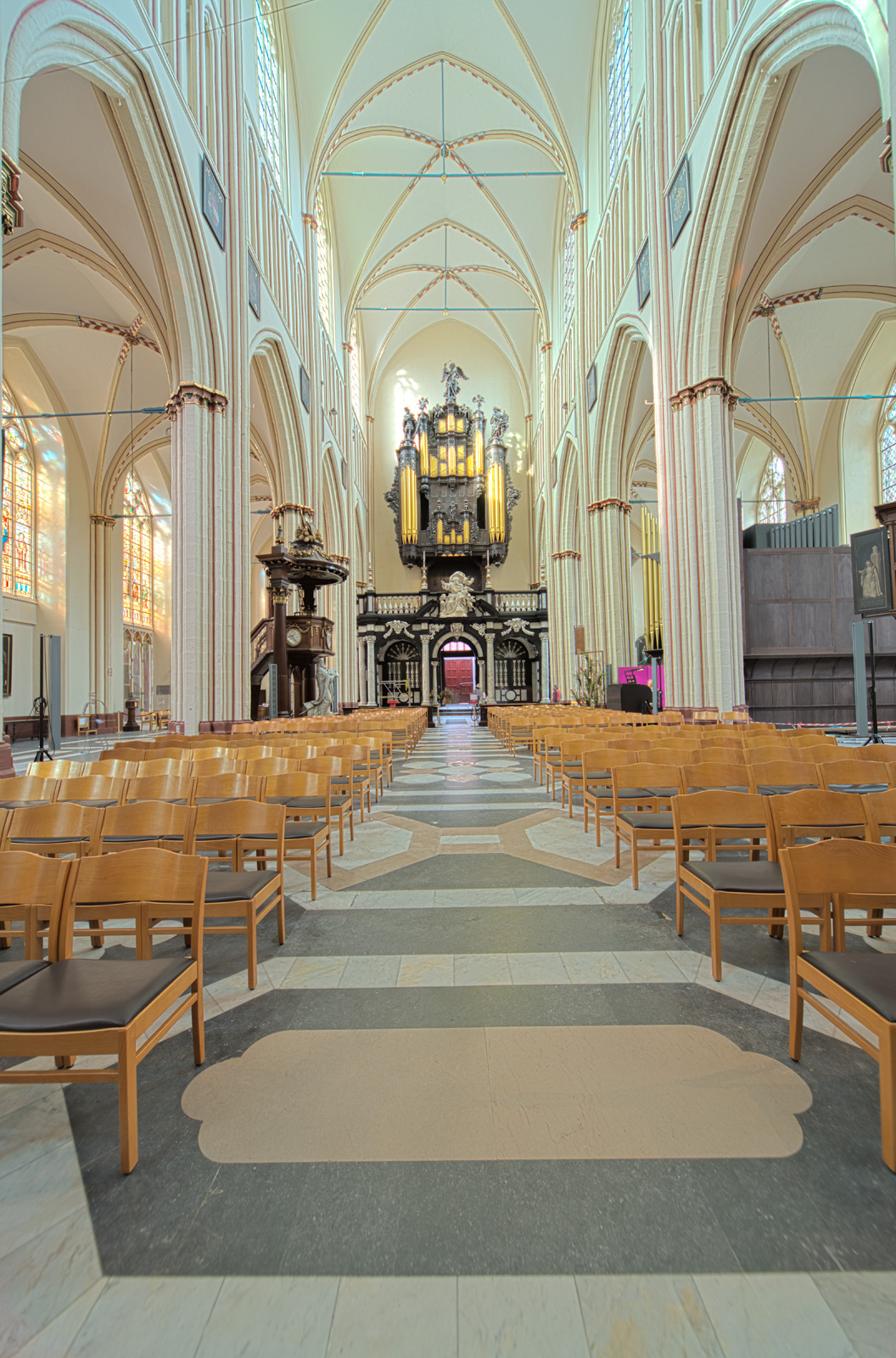 St Salvator's (HDR)